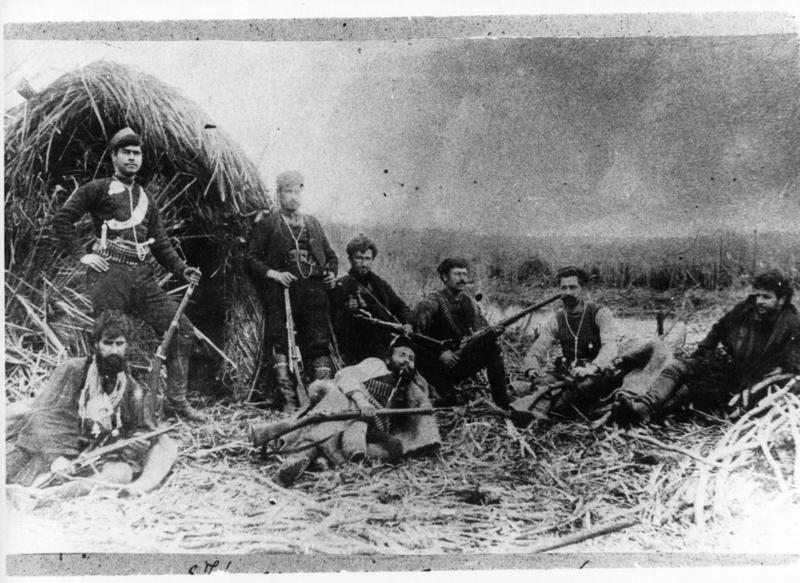 Гръцката андартска чета на капитан Аграс (Телос Агапинос) и Никифорос (Йоанис Деместихас) в Ениджевардарското езеро.